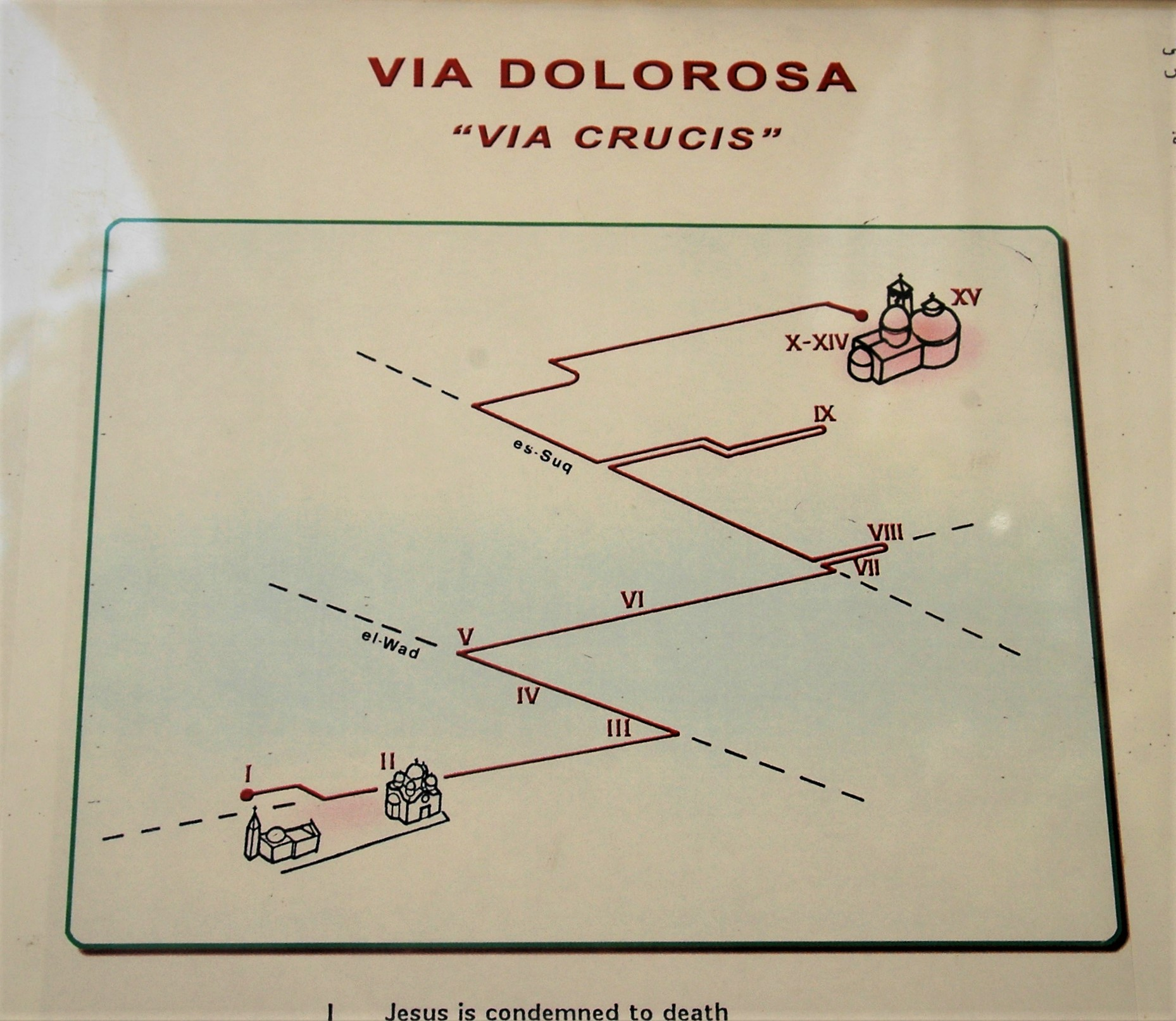 耶路撒冷耶穌苦路14站位置圖 Jerusalem Jesus Road 14 Station Location Map